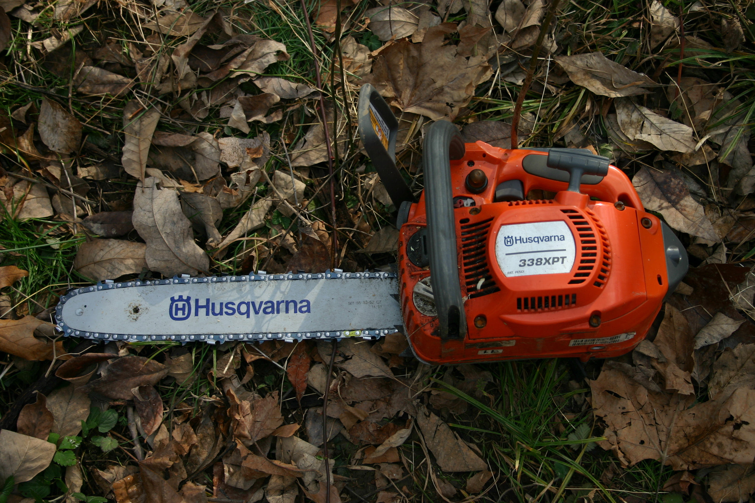 Husqvarna 338XPT chainsaw